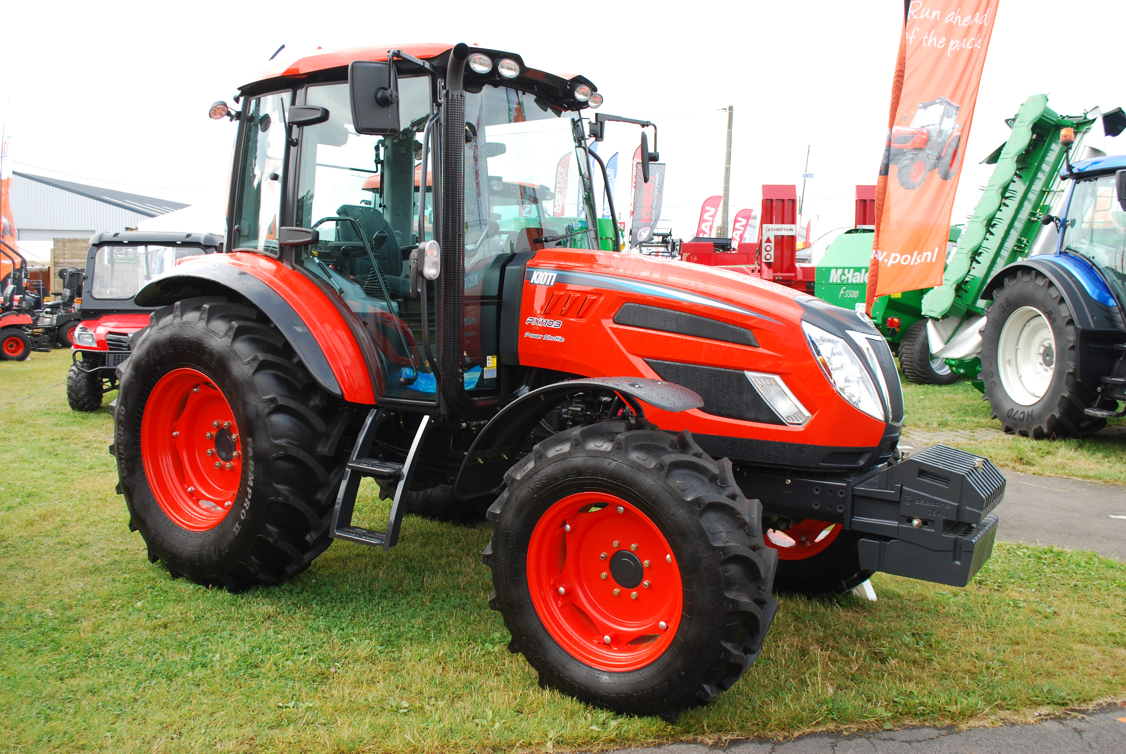 Vue de la Foire agricole de Libramont, dans le Luxembourg belge (82e édition en 2016).